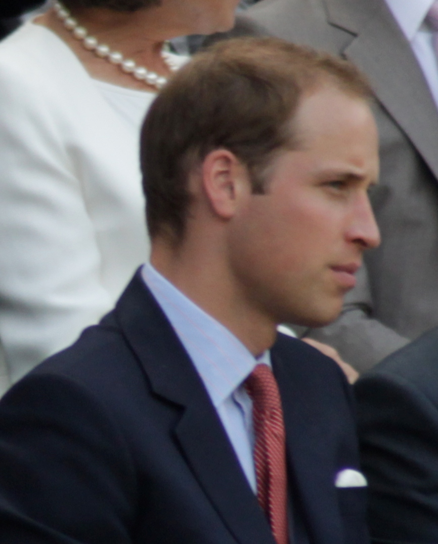 William, duc de Cambridge, Wimbledon 2011